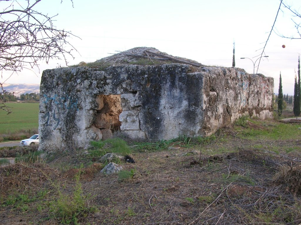 קבר סית מנע - מבת כללי